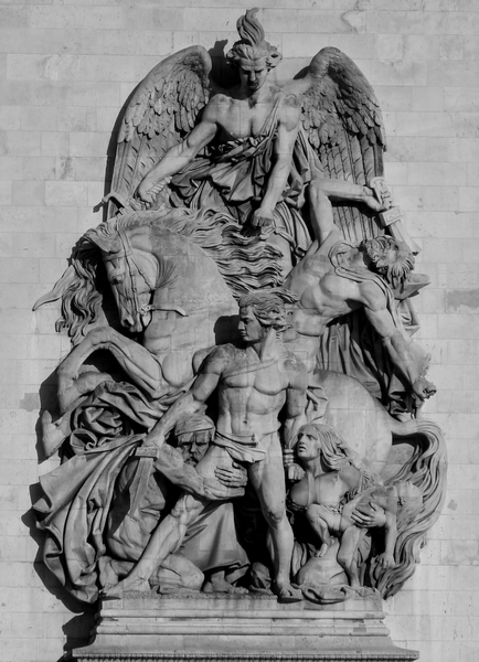 L'Arc de Triomphe à Paris, vu depuis l'Avenue de la Grande-Armée: la Résistance, par Antoine Etex (bas-relief de droite).